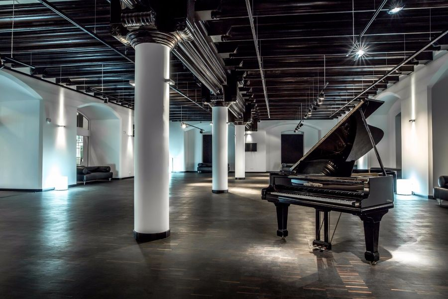 Galeria Południowa - Opera na Zamku w Szczecinie